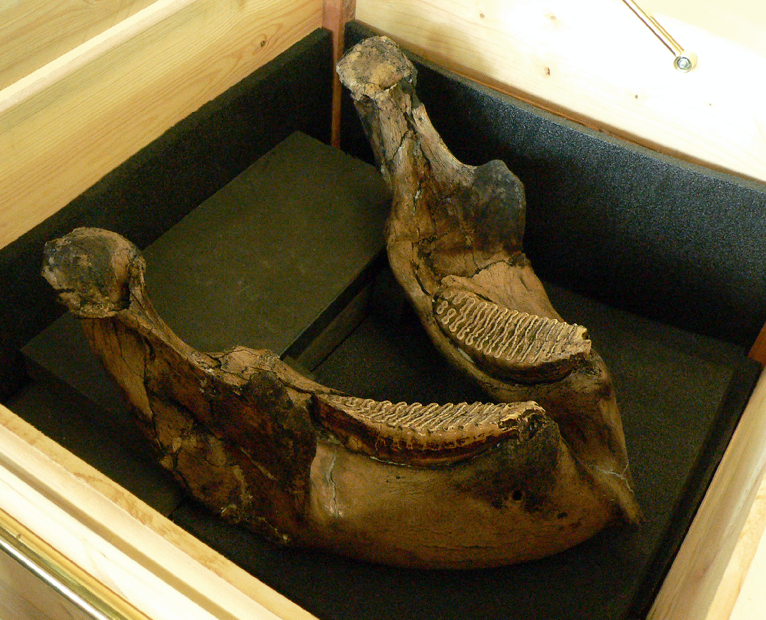 Kiefer des Waldelefanten von Schöningen